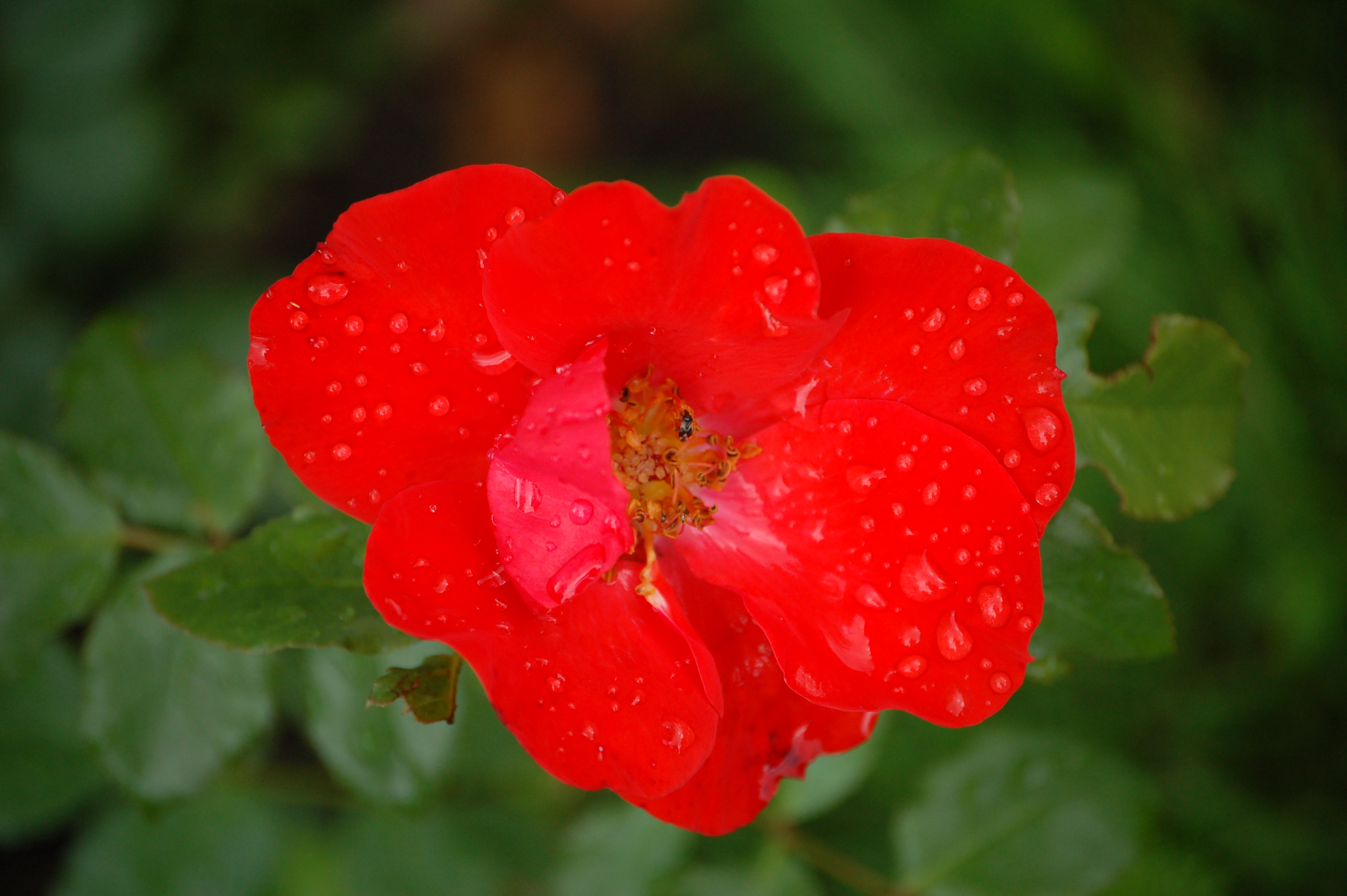 Rosa 'Paso Doble'